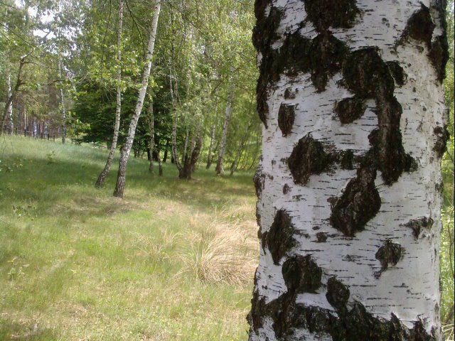 Rezervaţia naturală "Mestecănişul de la Reci", judeţul Covasna